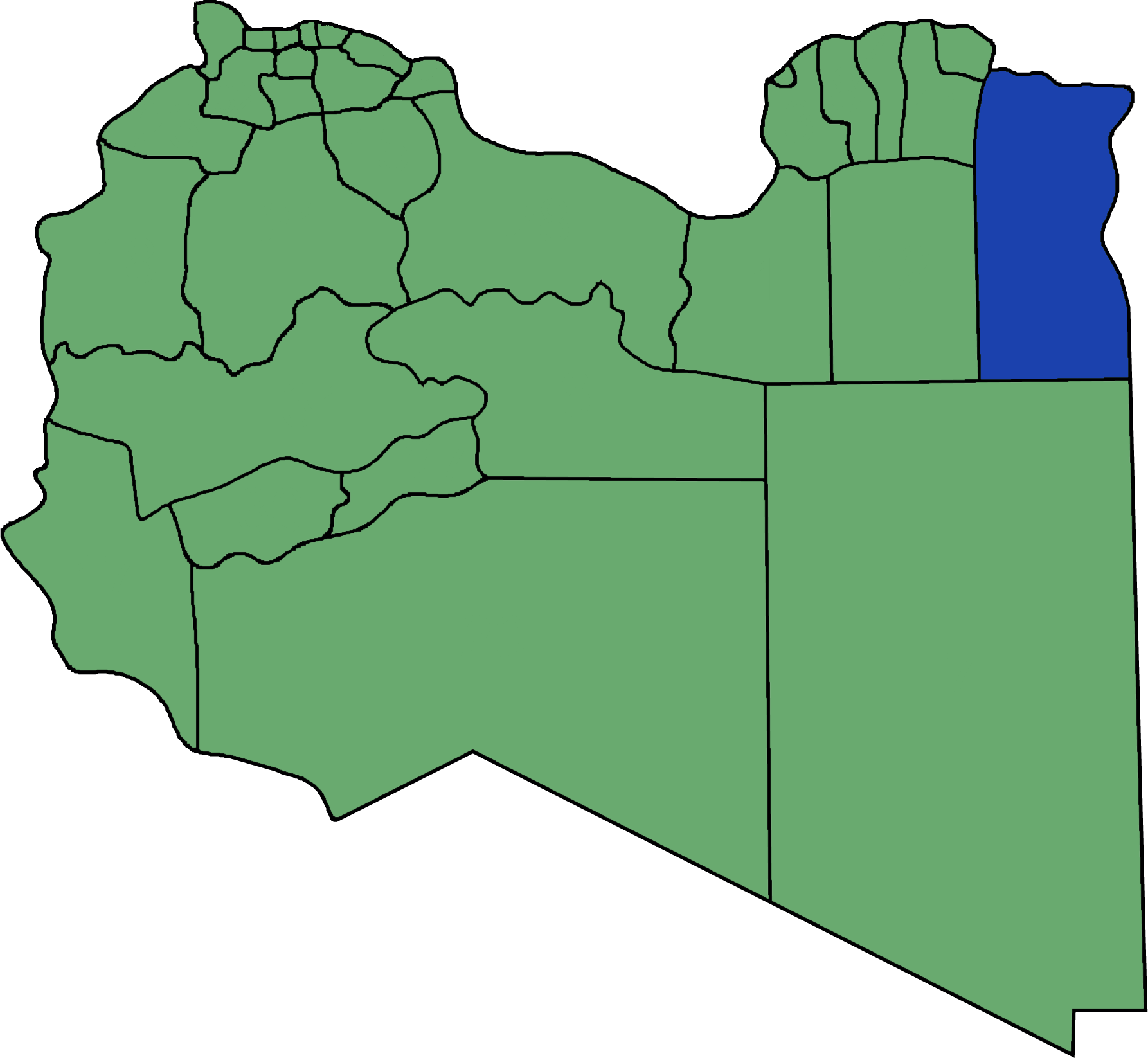 Die neuen Gemeinden (Munizipien) in Libyen. Al Butnan hervorgehoben.